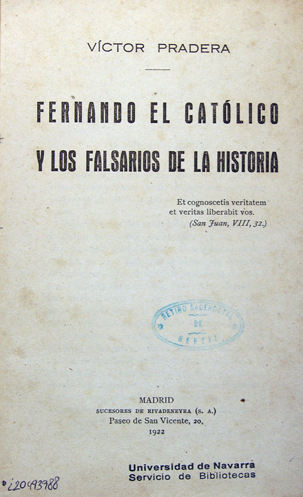 Portada de Fernando el Católico y los falsarios de la historia, obra del escritor y político Víctor Pradera, 1922.